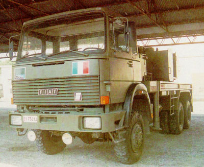 Autosoccorso FIAT M 120, Esercito italiano.